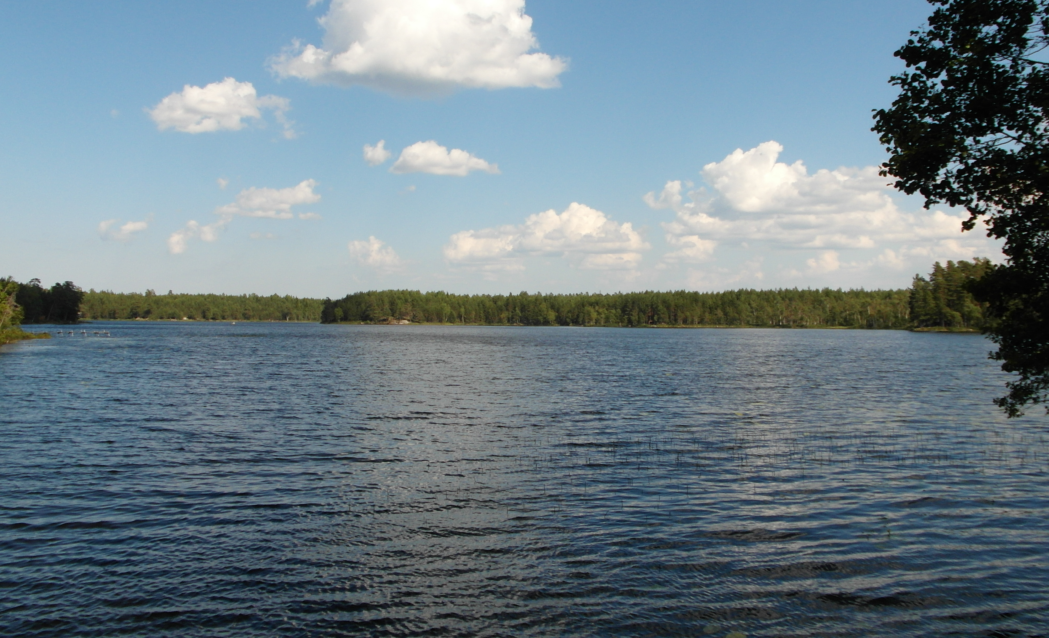 Älgsjön, Åkers bergslag, Strängnäs kommun, Södermanland